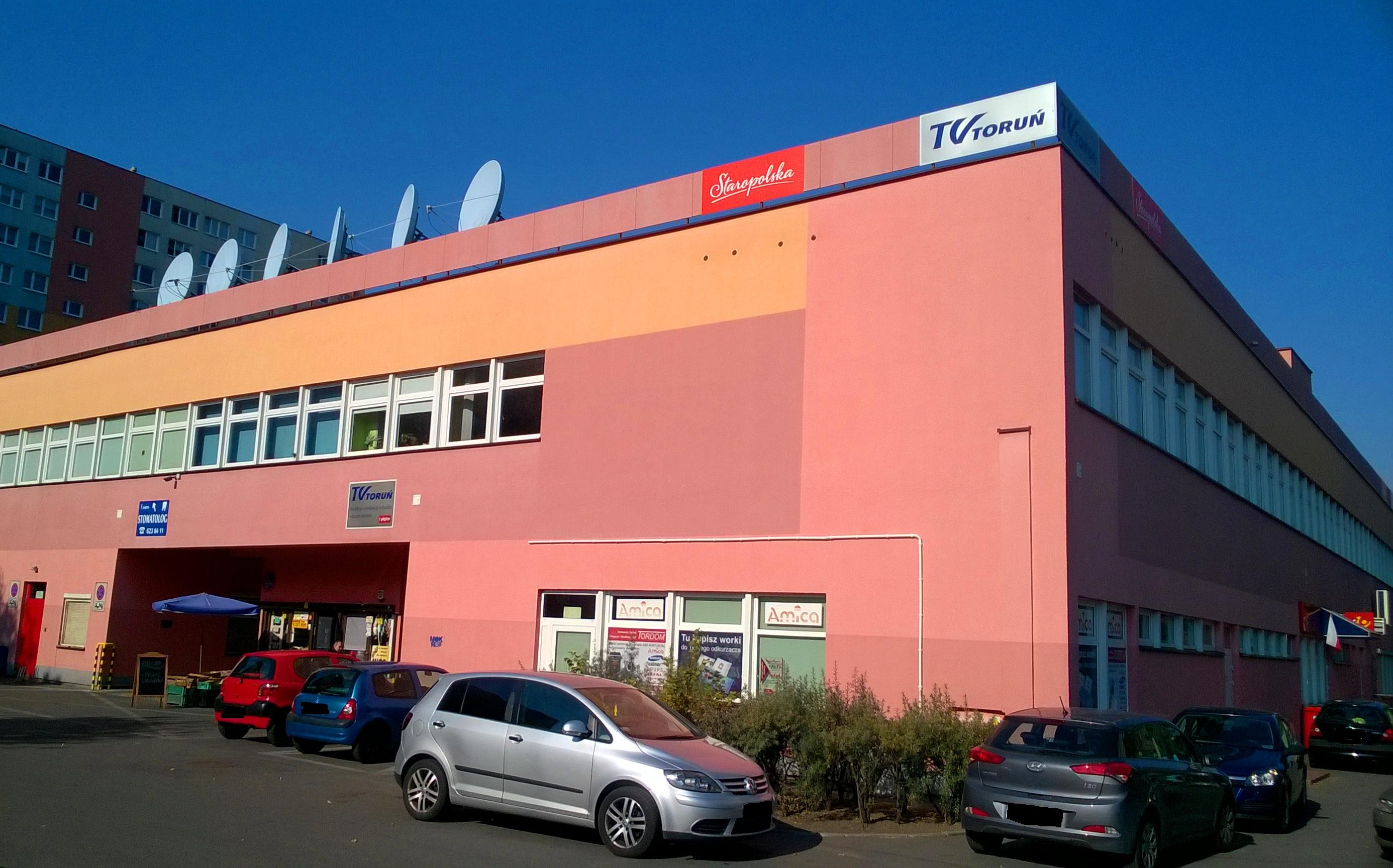 Siedziba TV Toruń